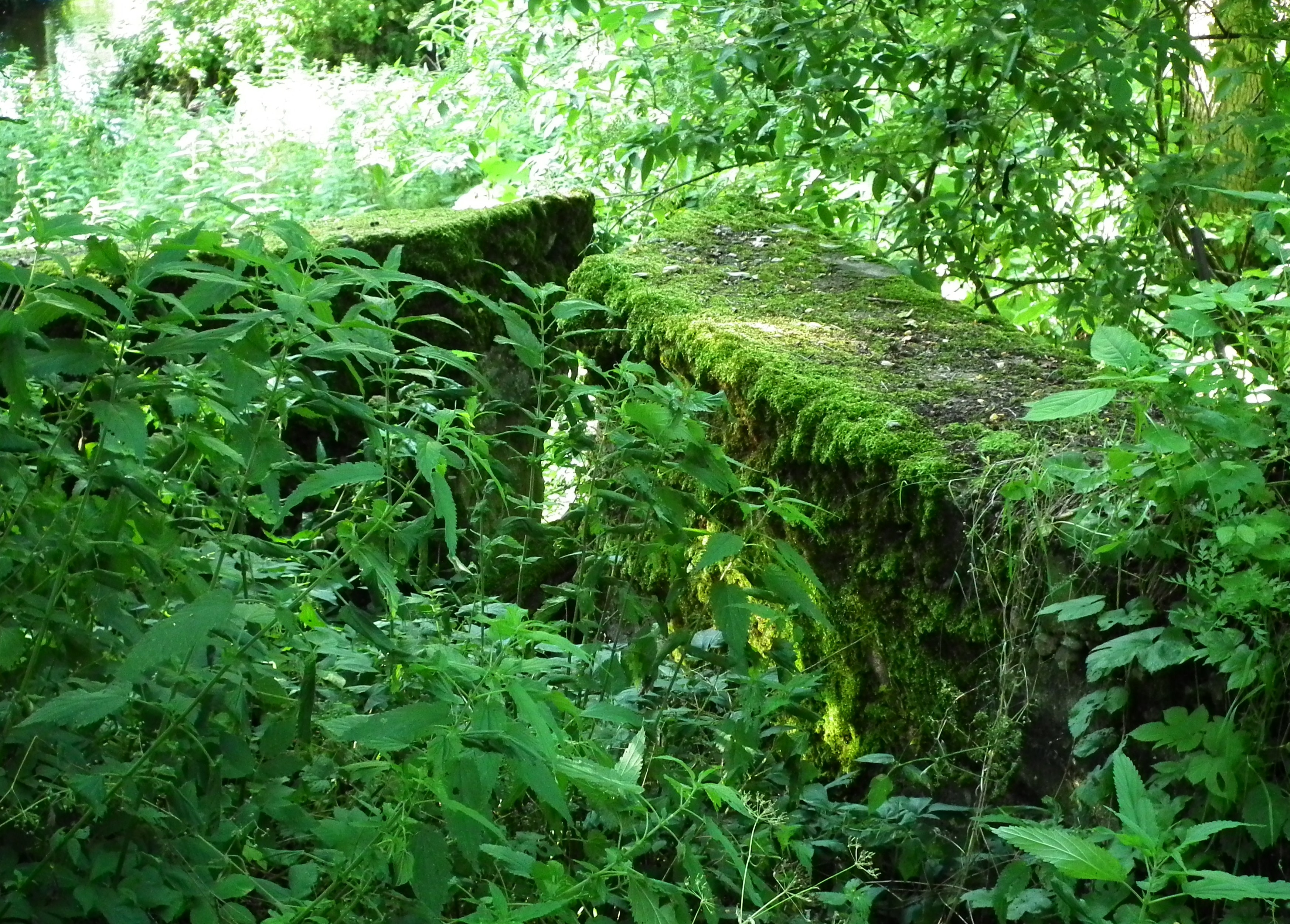 Samica Kierska koło Niemieczkowa - ruiny mostu.